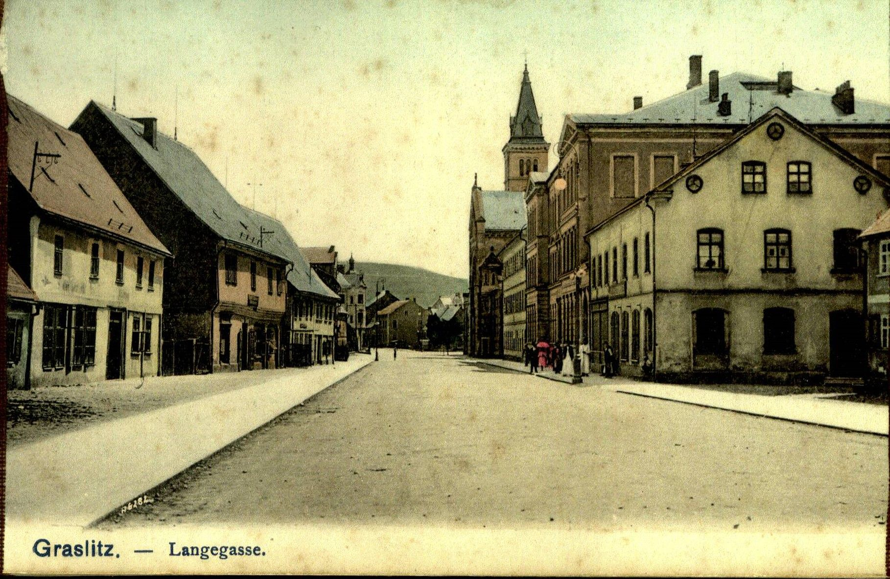 Altes Foto von Kraslice (Graslitz), heute Tschechien: Lange Gasse, vormals Goethestraße, Richtung Südosten